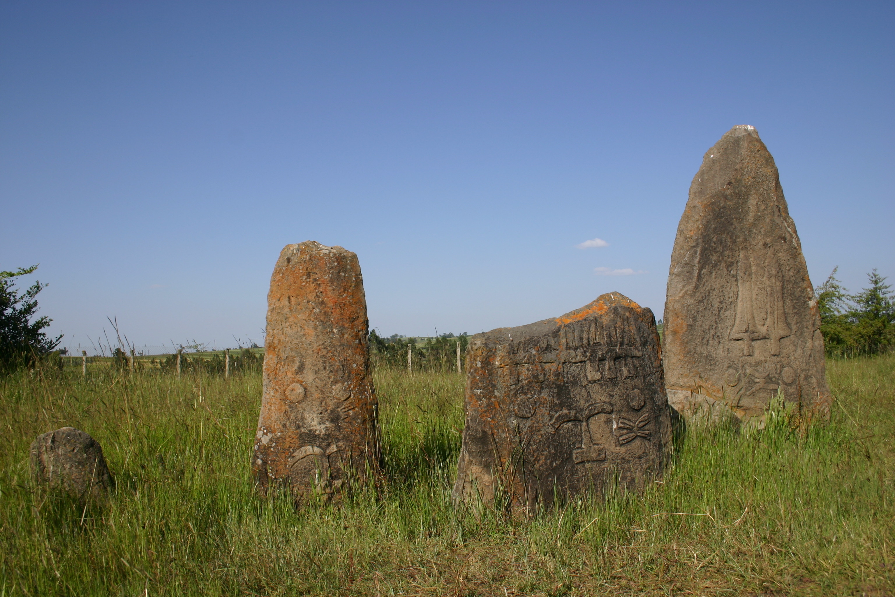 Stèles sculptées